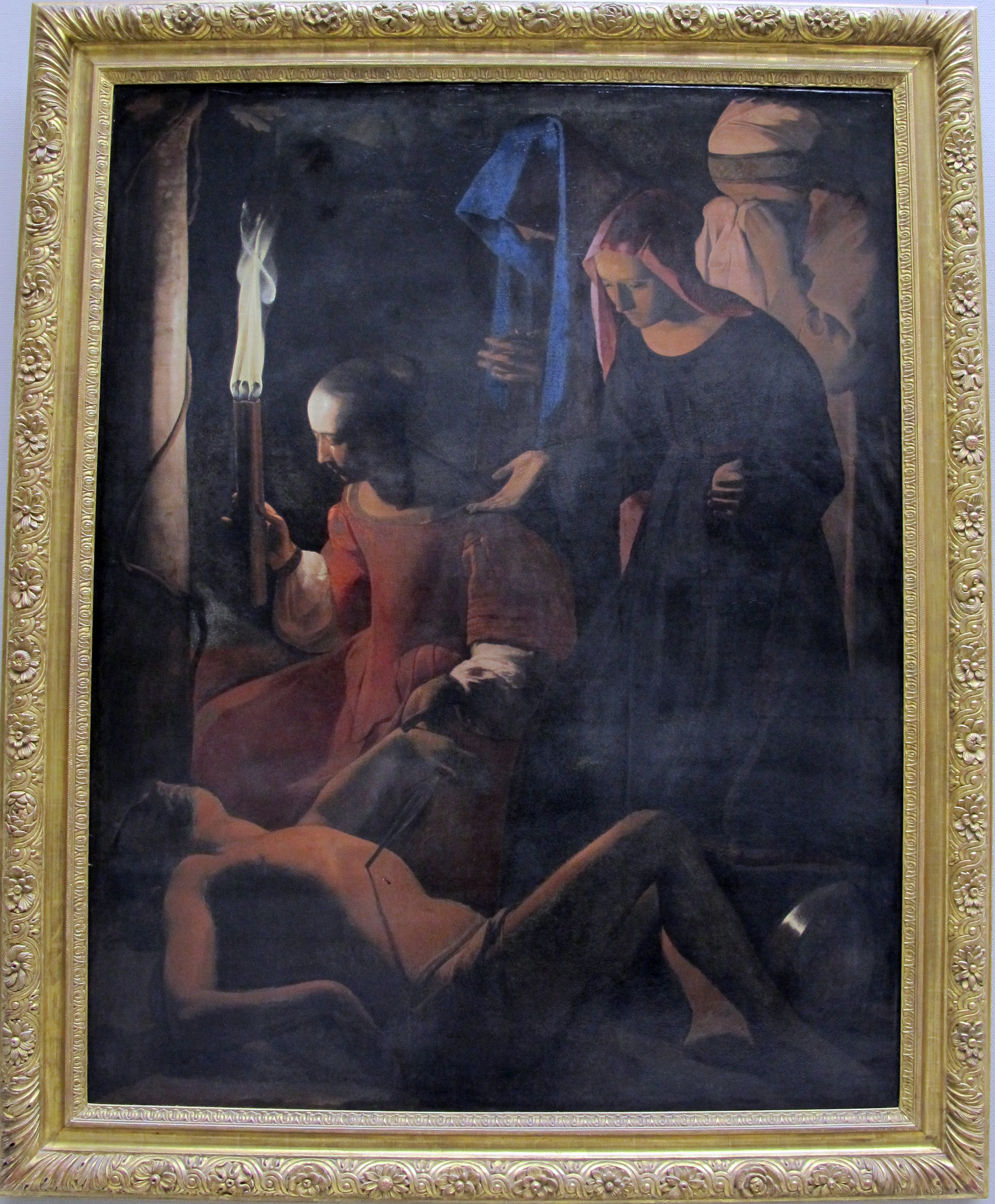 Pittura francese del XVII secolo, Louvre, Parigi